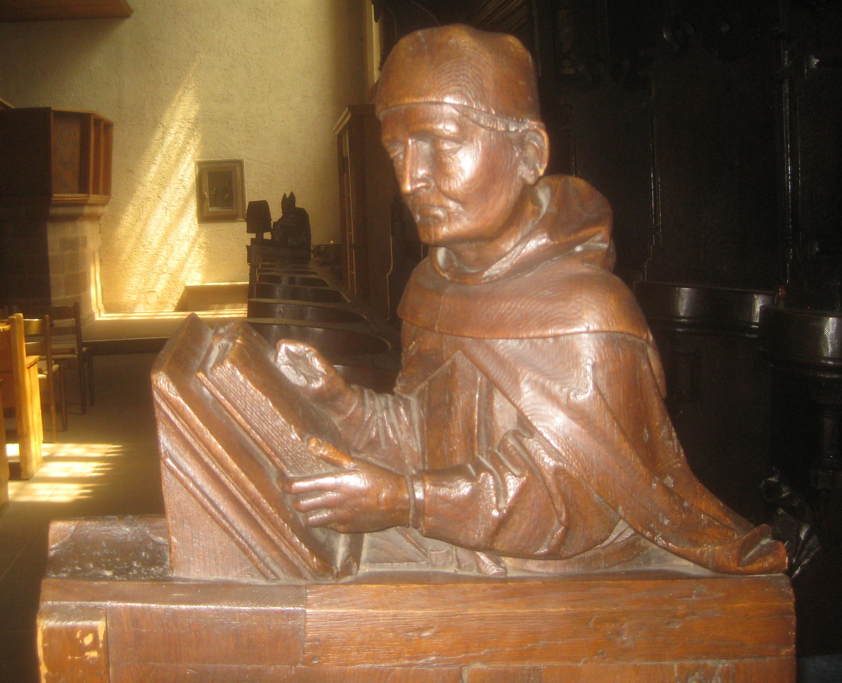 Chorgestühl der Leonhardskirche, Südostfassade, linke Hälfte der vorderen Sitzreihe, rechte Abschlusswange, Aufsatzfigur von Albertus Magnus.